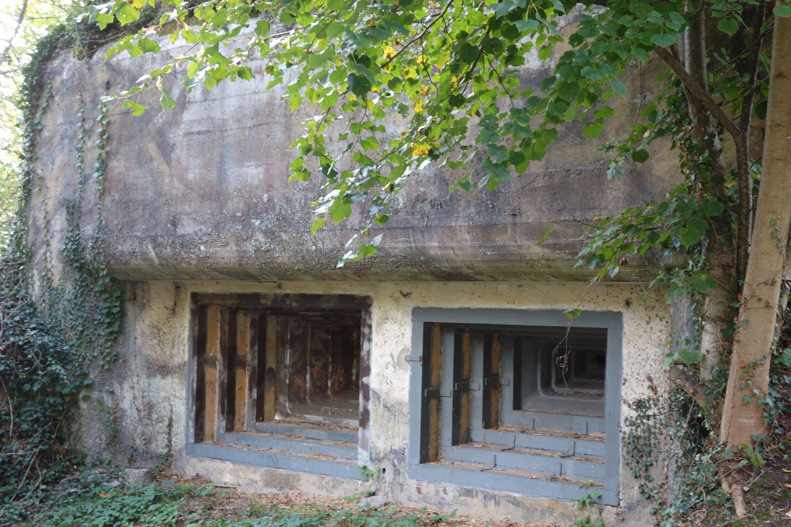 Artilleriewerk Ober Nas, Vitznau LU, Schweiz: Mg-Stand 4 «Minerva»